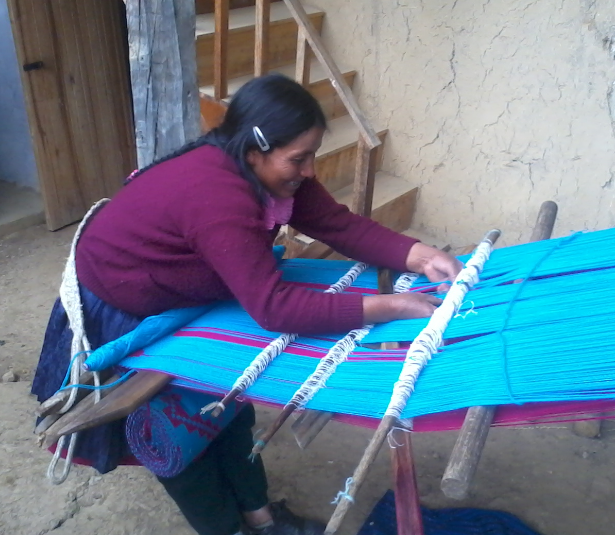 Máxima Acuña de Chaupe, agricultora cajamarquina y defensora del medio ambiente; tejiendo una frazada artesanal.